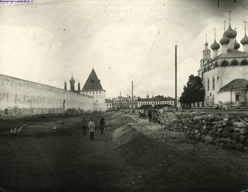 Стена Спасо-Преображенского монастыря и церковь Рождества Богородицы (располагалась на территории современной Богоявленской площади) в Ярославле.